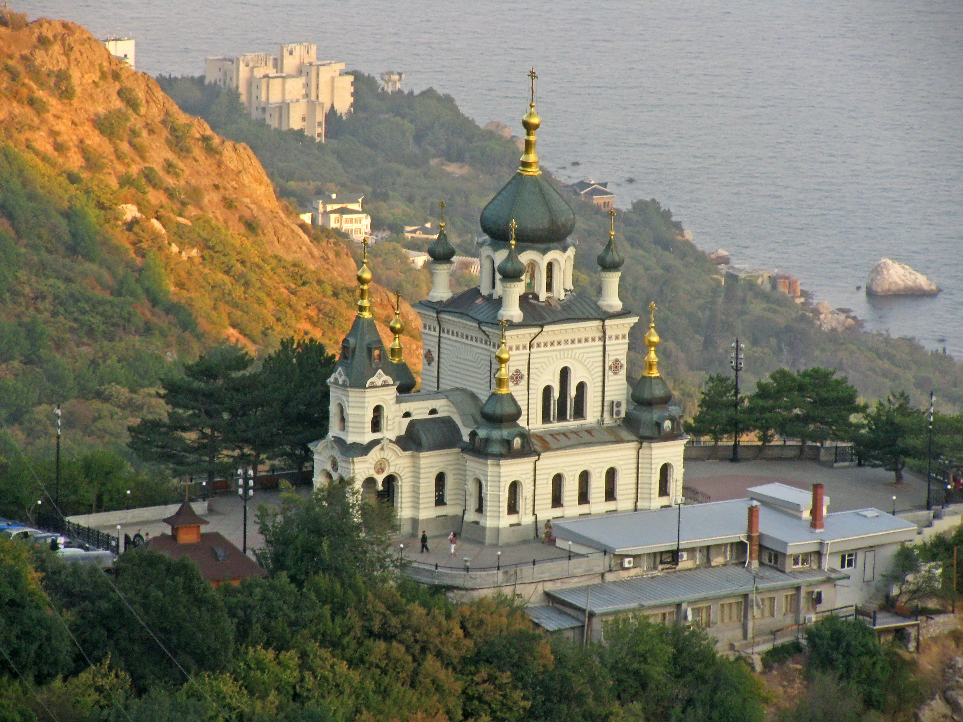 Церква Воскресіння Христового, Форос, с. Форос, поблизу перевалу Байдарські ворота